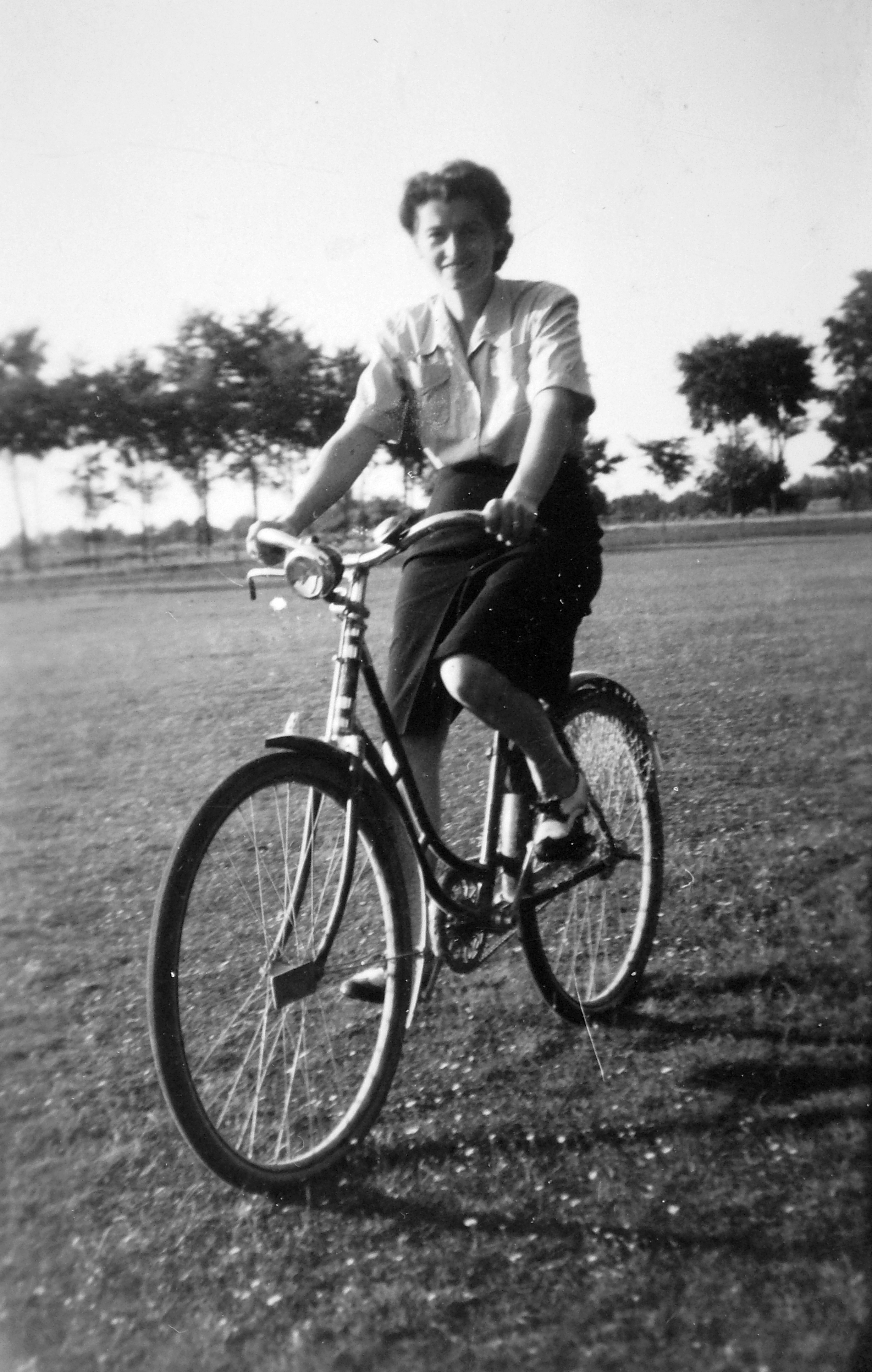 Weiss Manfréd gyártmányú Csoda női kerékpár. Location: Hungary Tags: bicycle, Weiss Manfréd-brand Title: Weiss Manfréd gyártmányú Csoda női kerékpár.